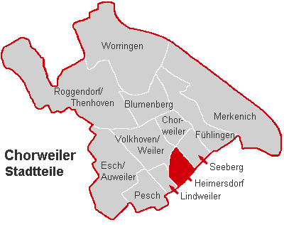 Lagekarte Heimersdorf im Stadtbezirk Köln-Chorweiler